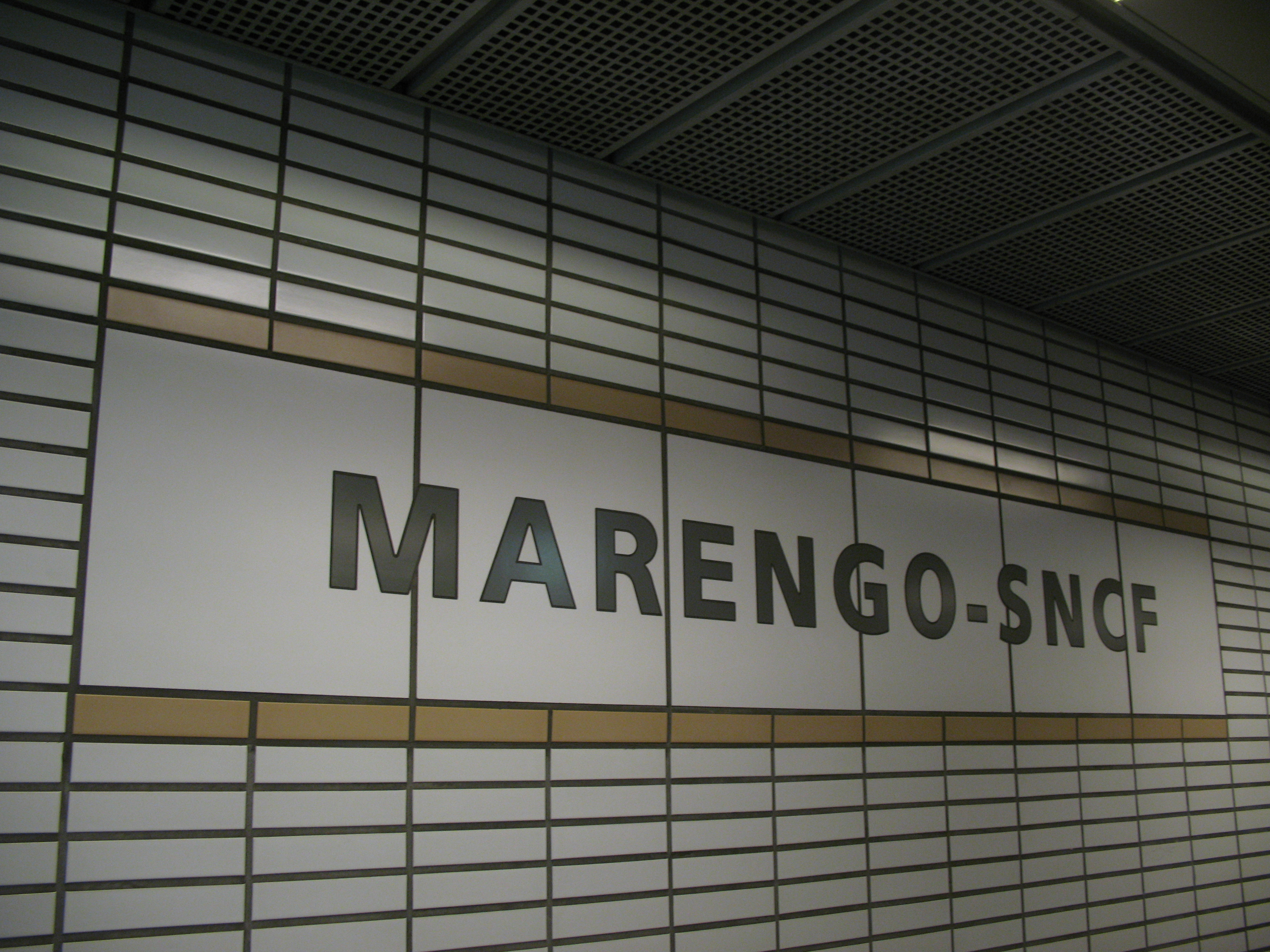 Métro de Toulouse - Ligne A - Marengo SNCF - Enseigne de station